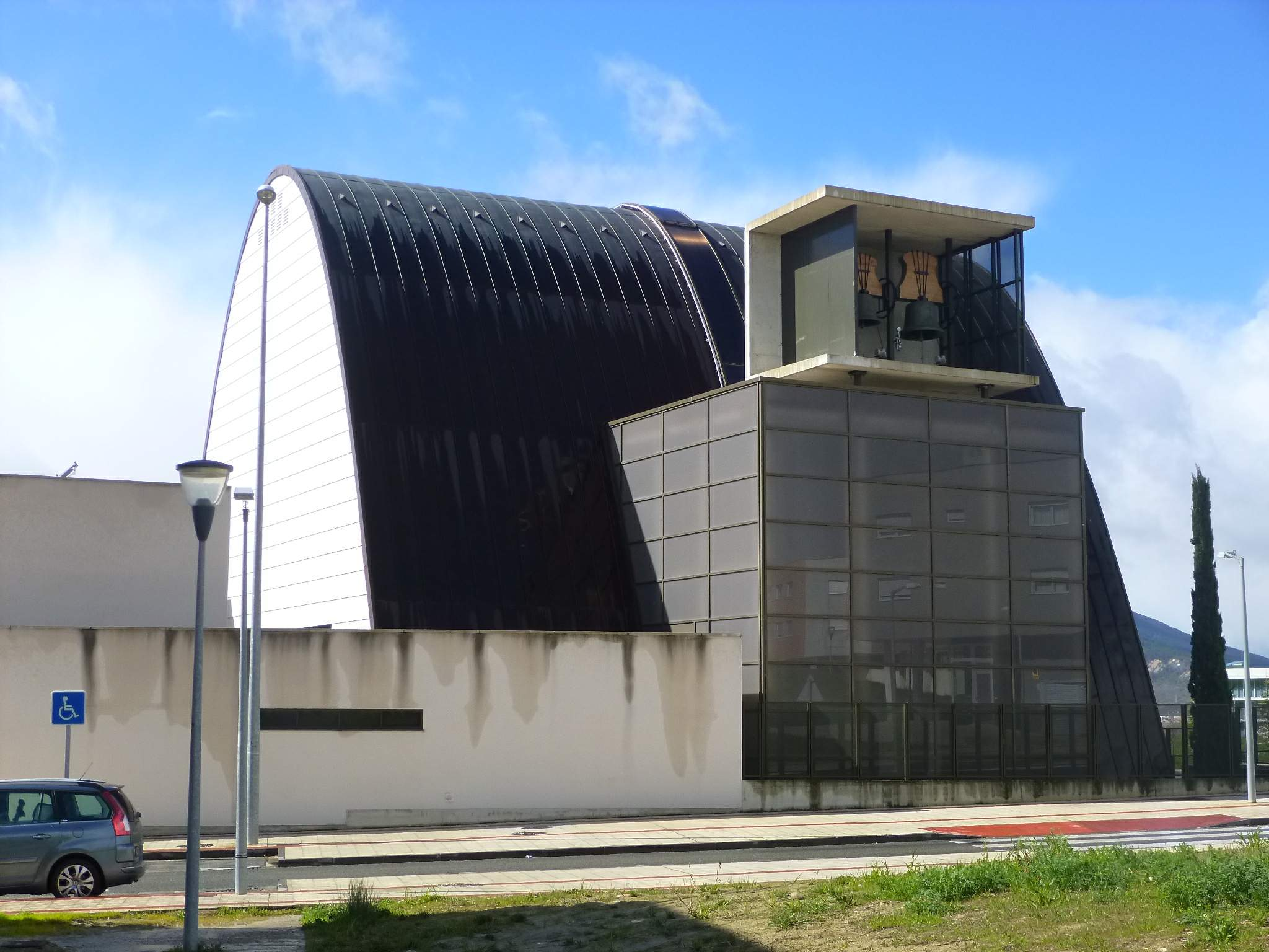 Iglesia de Santa Engracia, en Sarriguren (Egüés, Navarra)